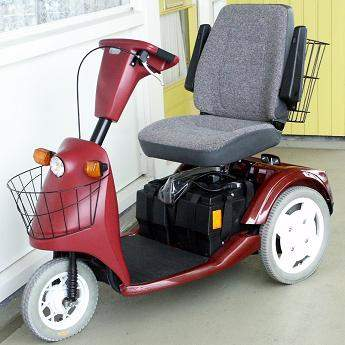 Een scootmobiel